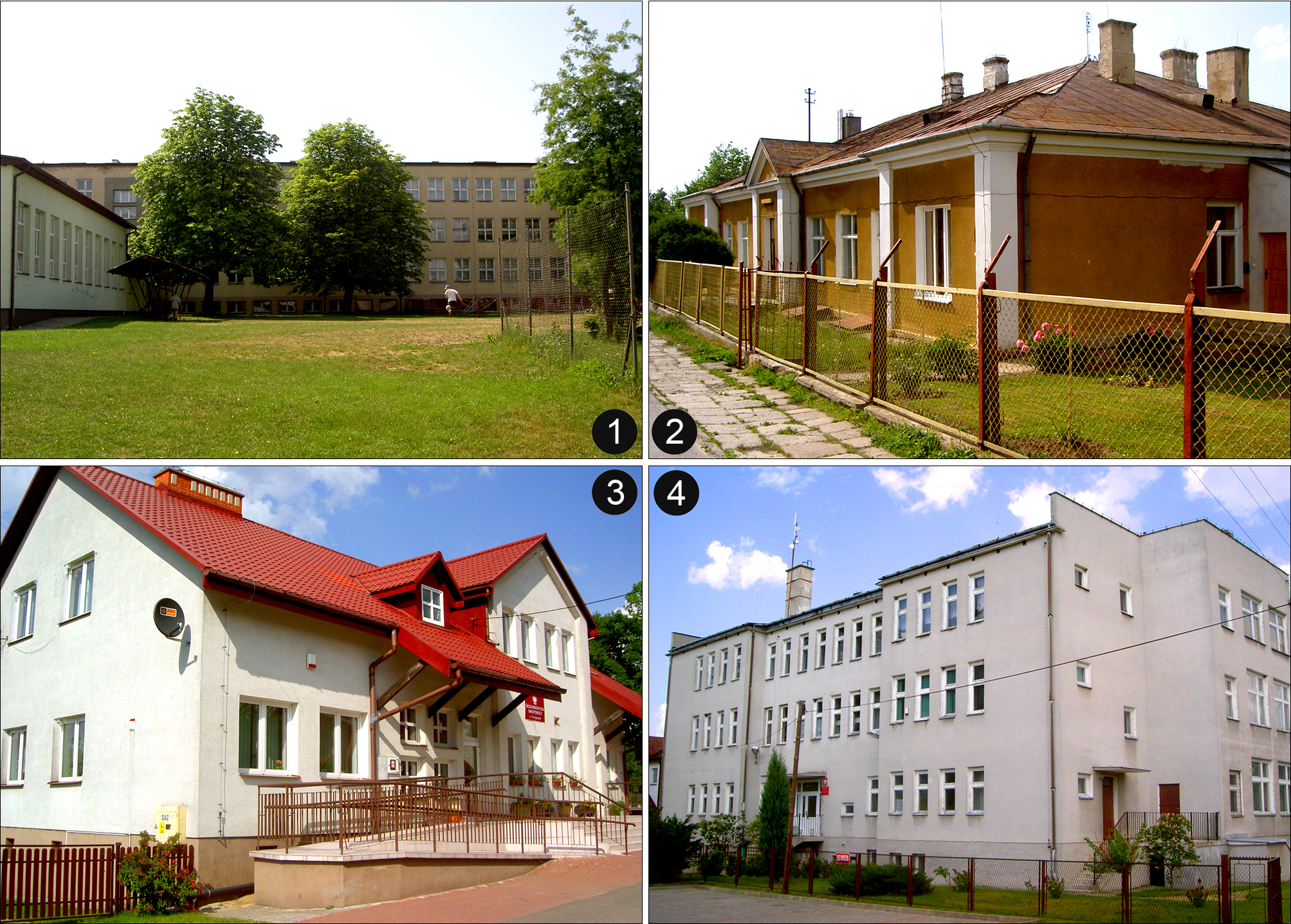 Tarnogród, Poland - Schools • Tarnogród, Polska - Budynki szkolnictwa